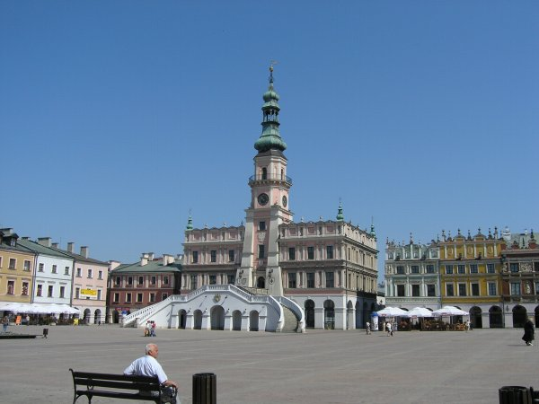 Rynek w Zamościu, zdjęcie własne 29 maja 2005